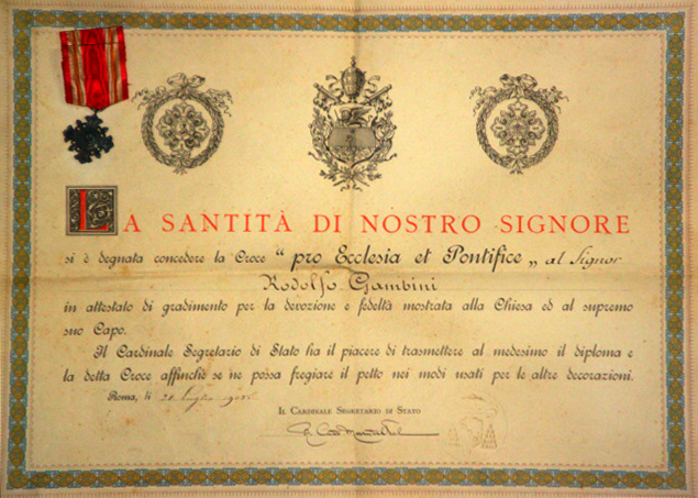 Documento originale che attesta la concessione della Croce Pro Ecclesia Et Pontifice a Rodolfo Gambini il 21 luglio 1905.